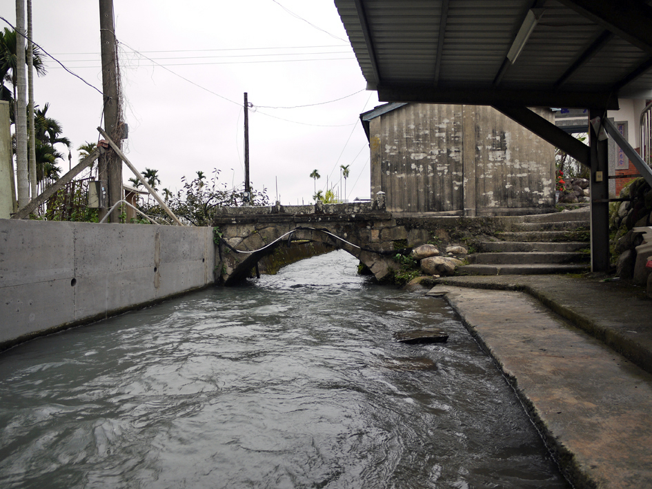 中文（台灣）: 東勢本圳與金門橋。